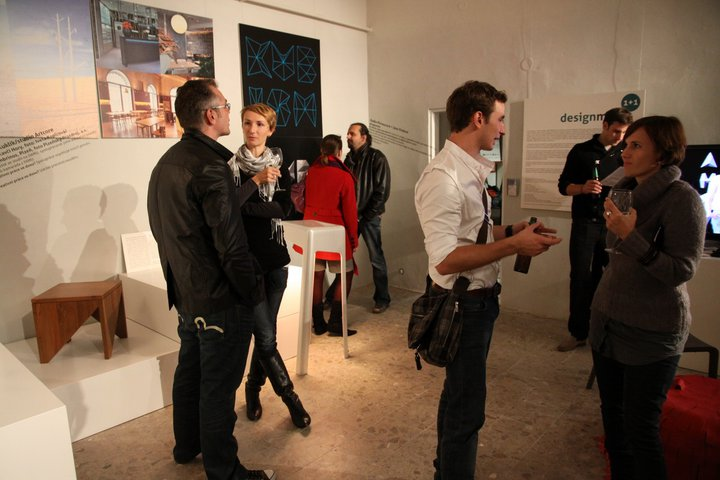 Výstava DesignMate